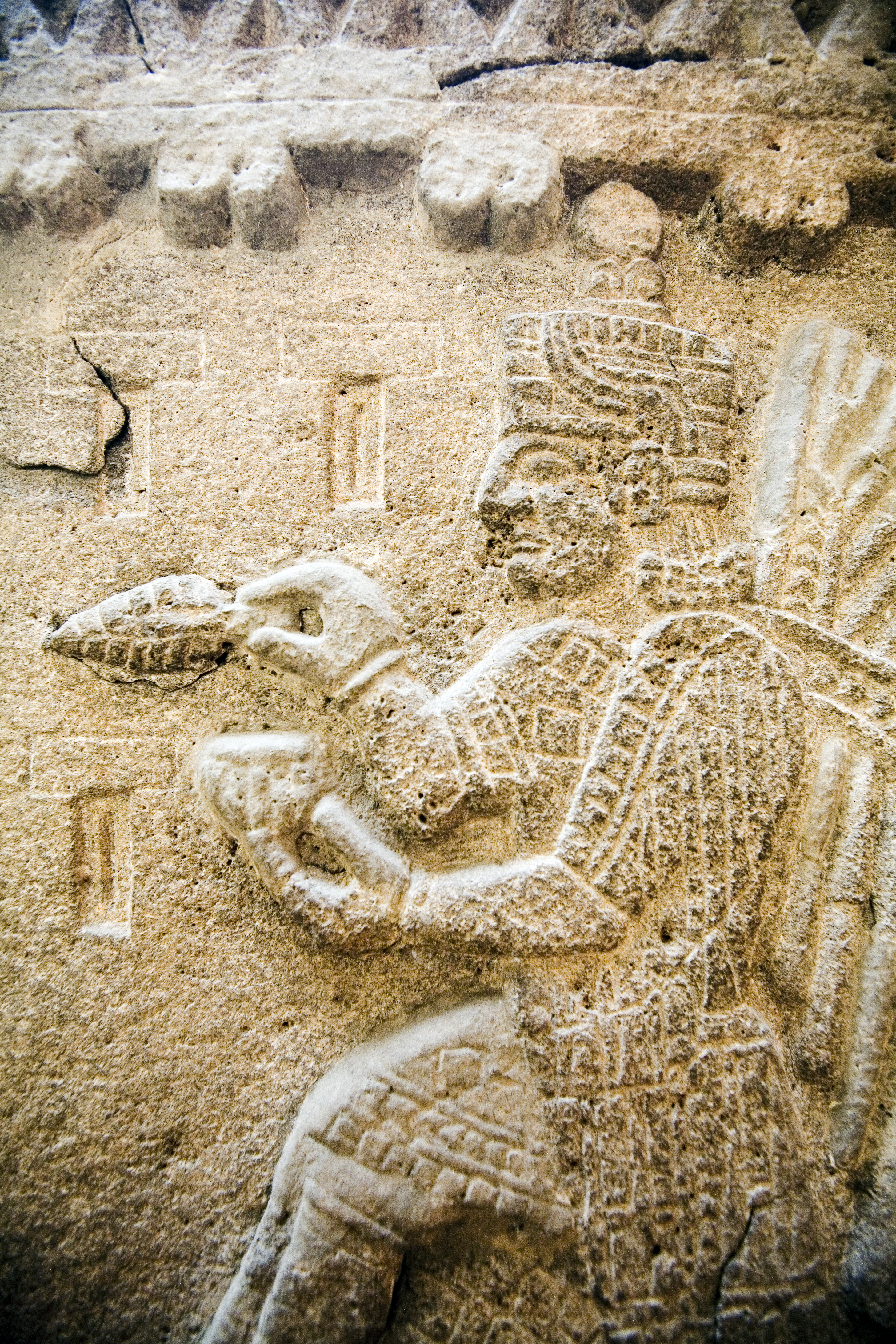 Haldi diety on Rusa Cube